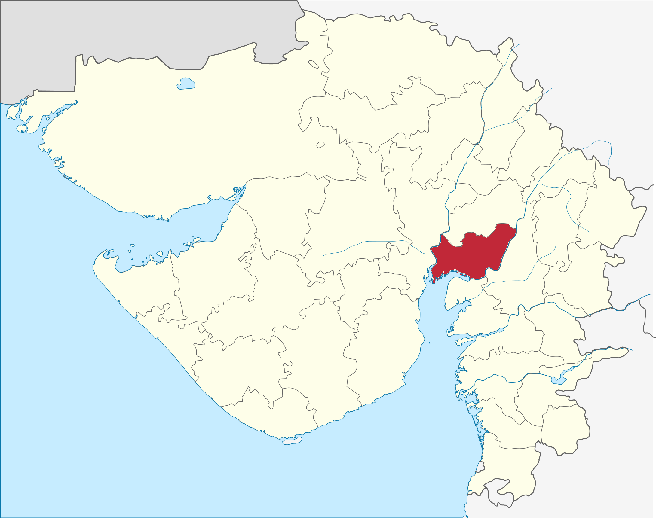 Distrito de Anand en Gujarat